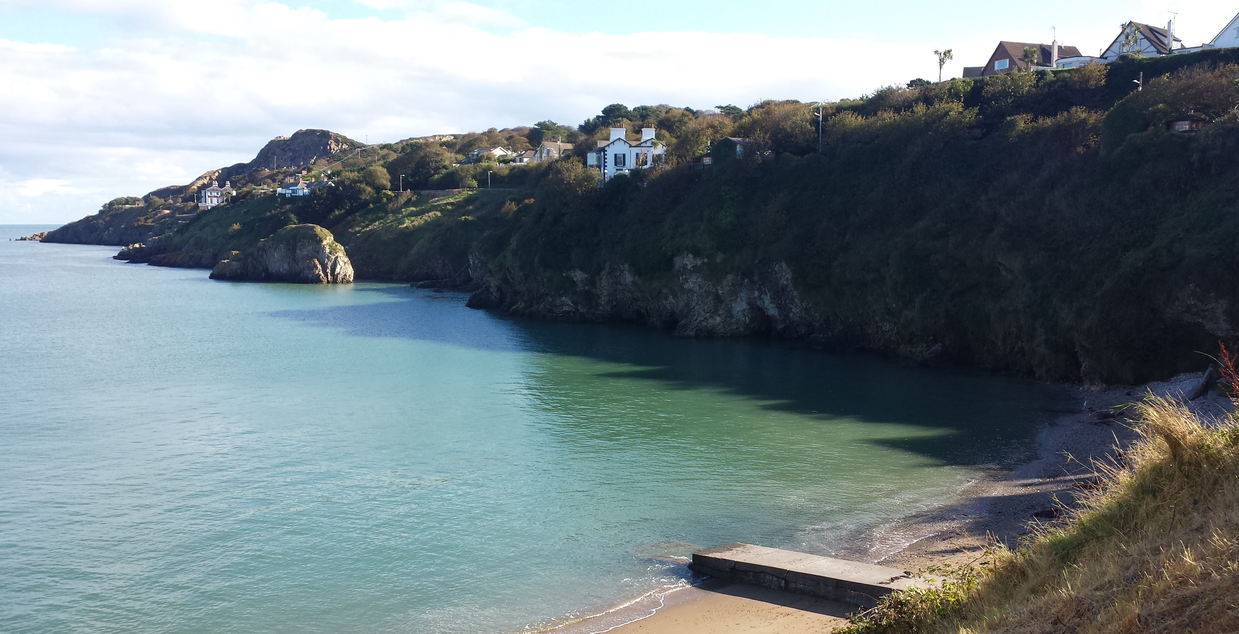 Strand von Howth, Irland - Coast of Howth, Ireland